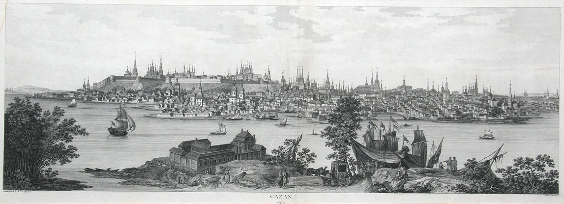 Вид Казани в 1767 году. Гравюра Франсуа Дени Не (1732–1817) (Grave par Nee) по рисунку Луи Николя де Леспинаса (1734–1808) (par M. le Ch. de Lespinasse). Париж.